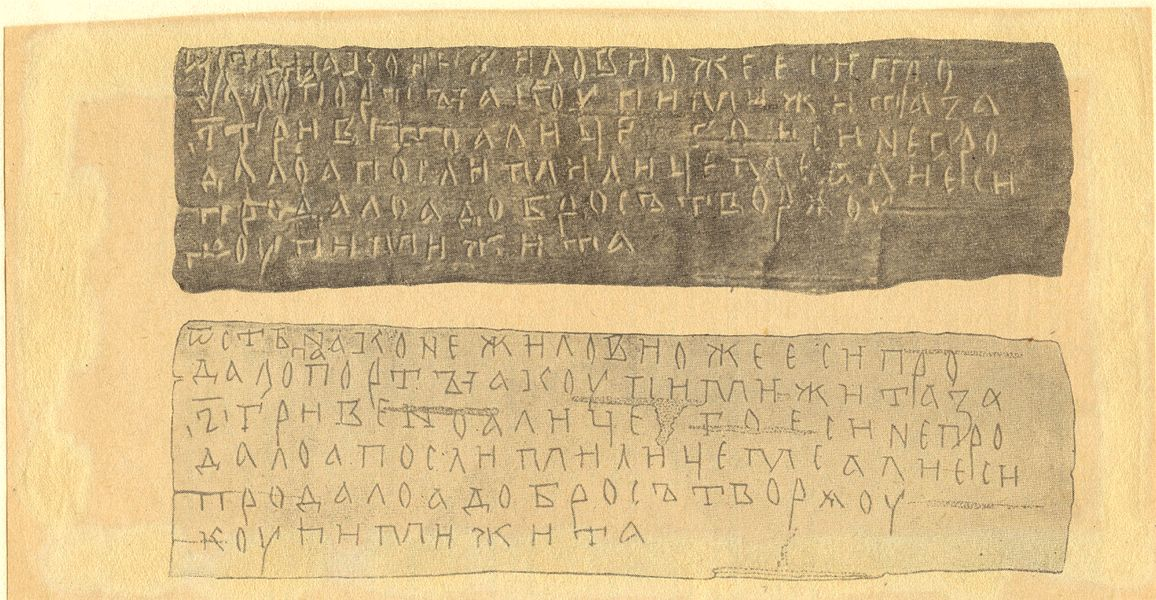 Віцебская берасцяная грамата (фота і прарысоўка)